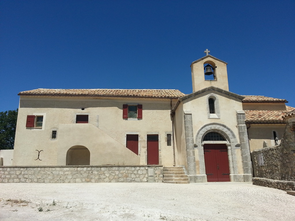 Église d'Agonès (Hérault)